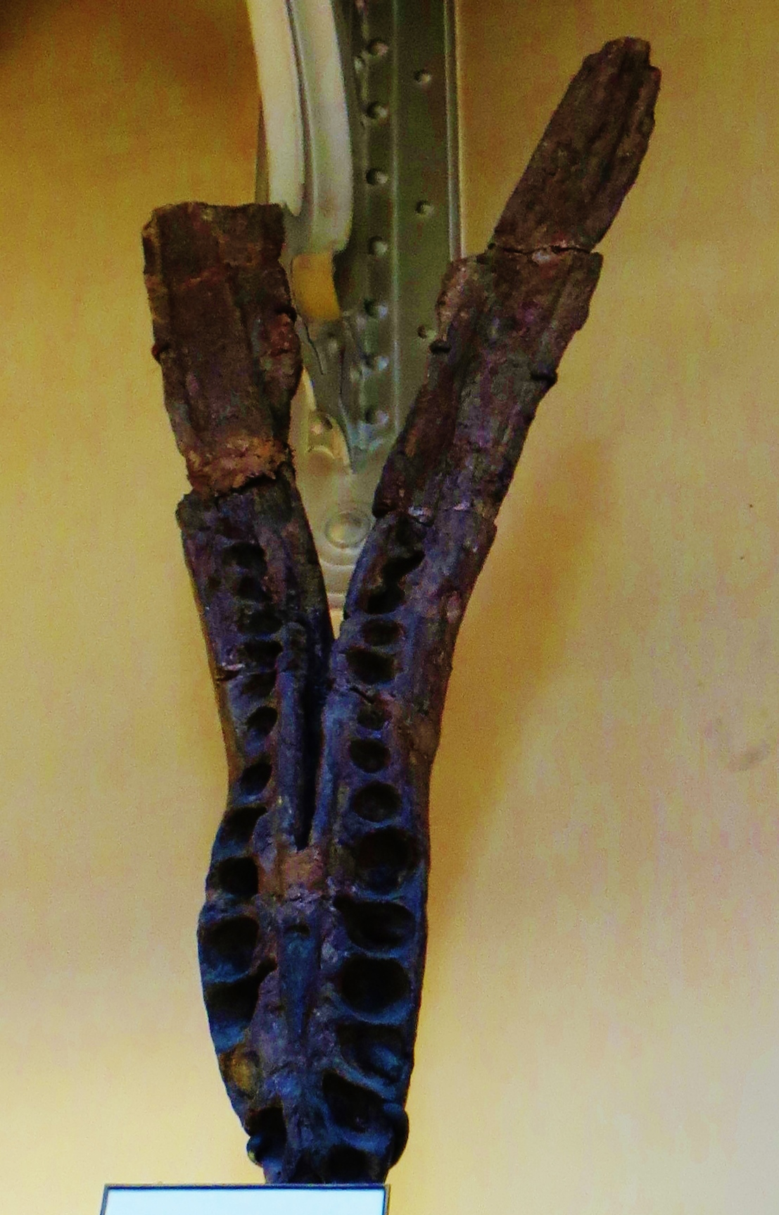 Fossil of Pliosaurus (MNHN cat.24.1), an extinct reptile- Took the photo at Musee d'Histoire Naturelle, Paris